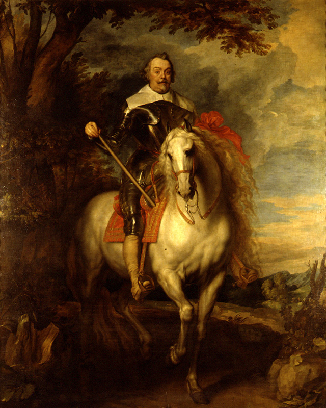 Retrato ecuestre del aristócrata, diplomático e historiador español Francisco de Moncada (1586-1635), tercer marqués de Aytona y gobernador interino de los Países Bajos entre 1633 y 1634.